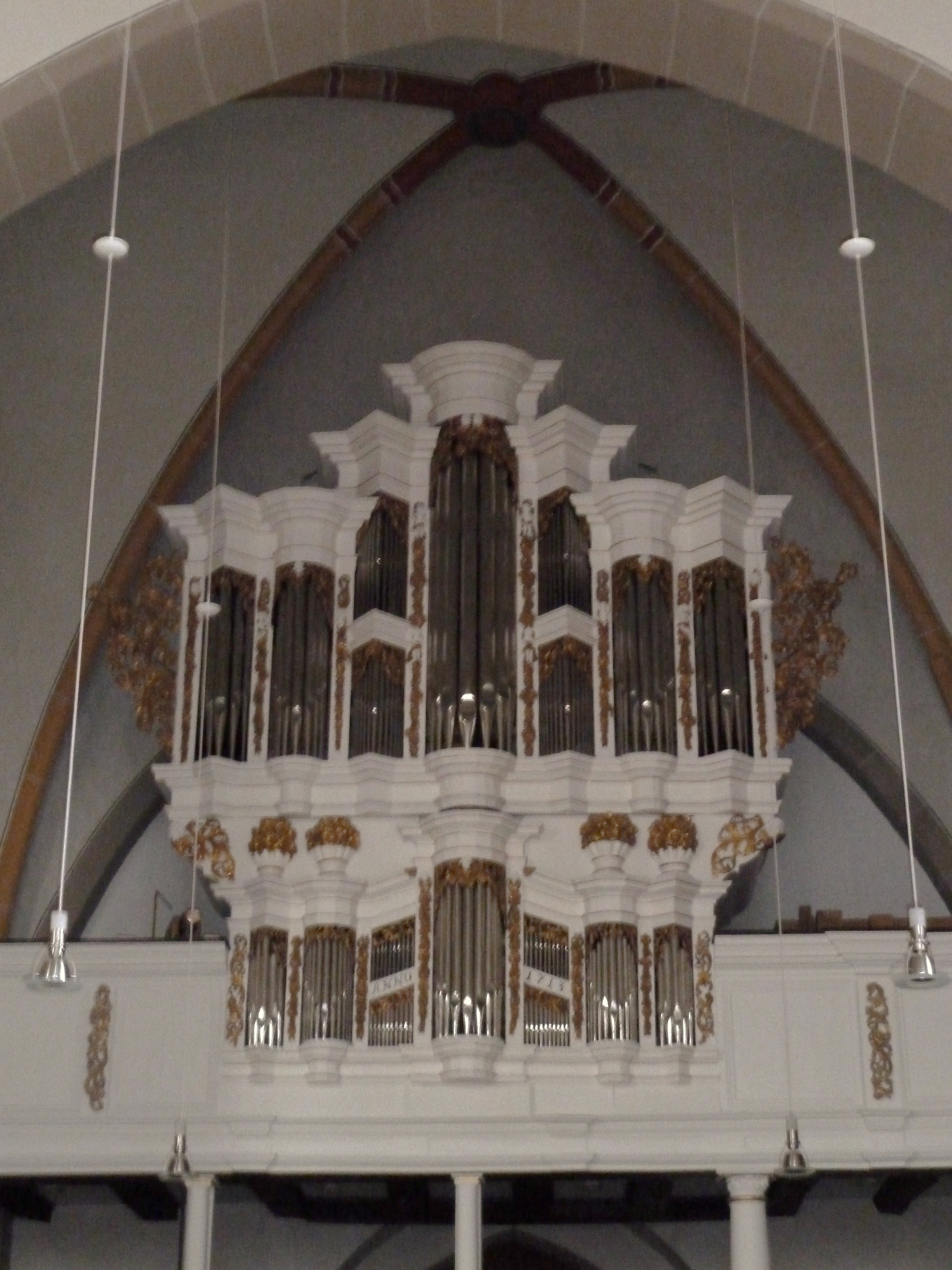 eigene Datei